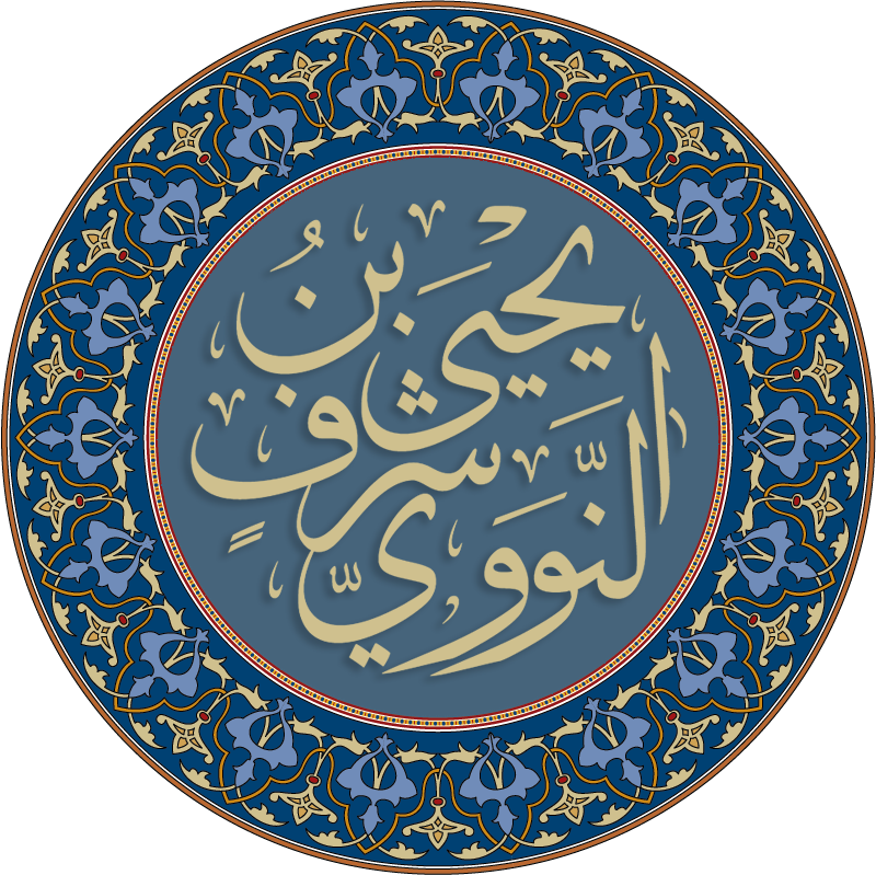 تخطيط لاسم الإمام النووي